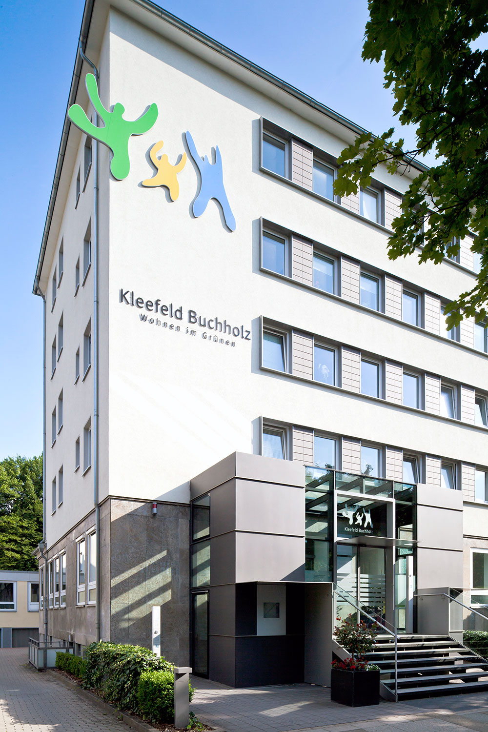 Eingang Berckhusenstr. 16